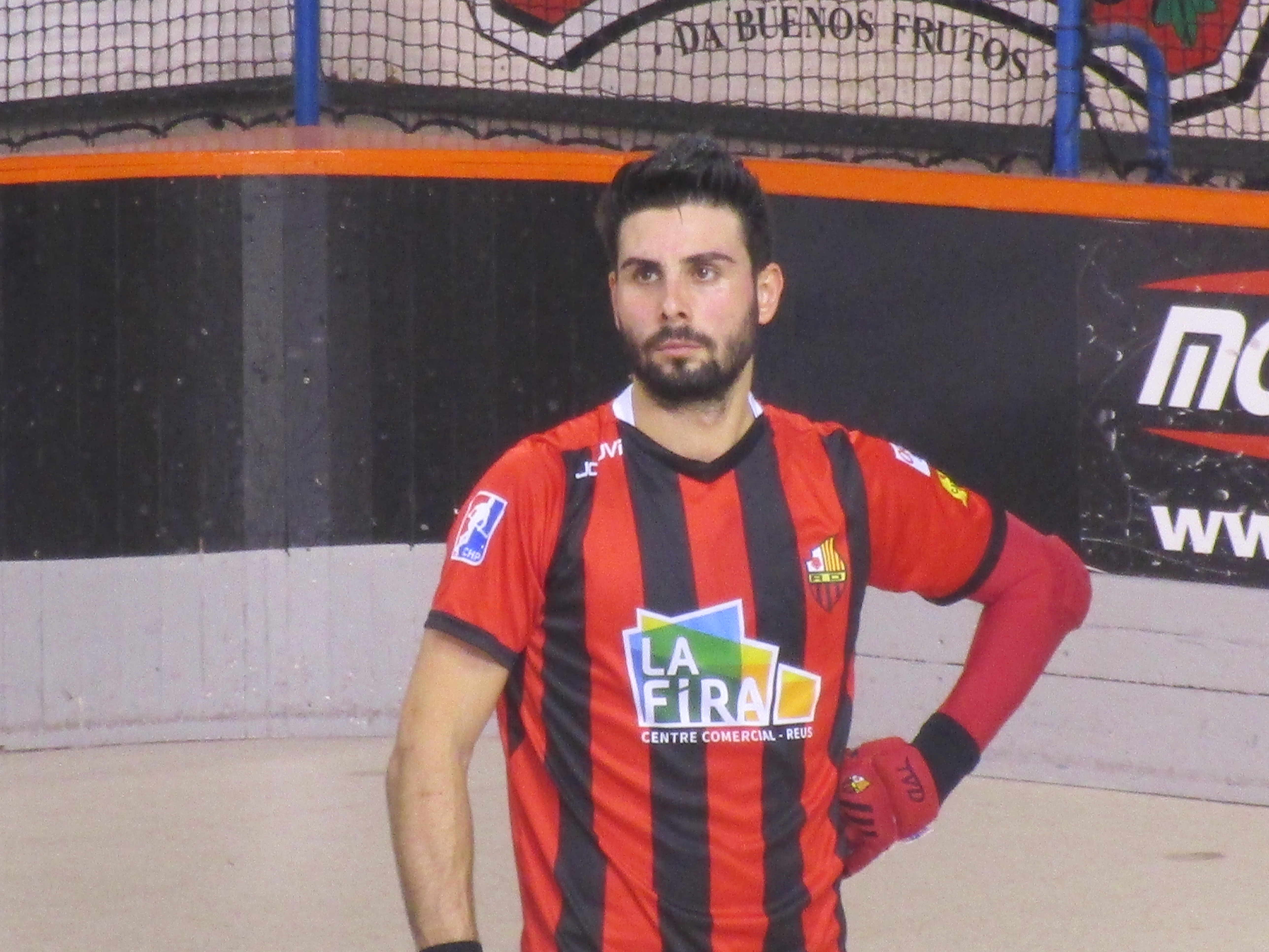 Marc Torra, jugador hockey Reus Deportiu